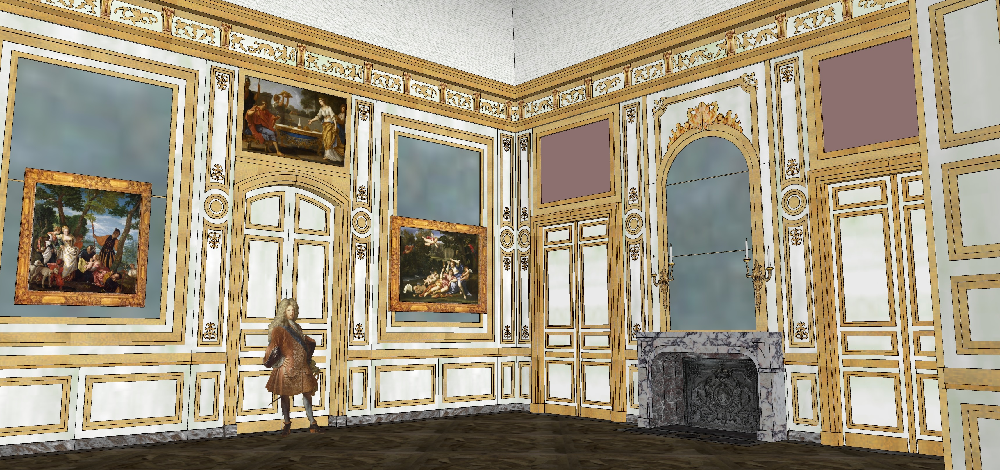 Essai de restitution du Grand Cabinet de l'aile des marronniers, avec les toiles en place vers 1705.